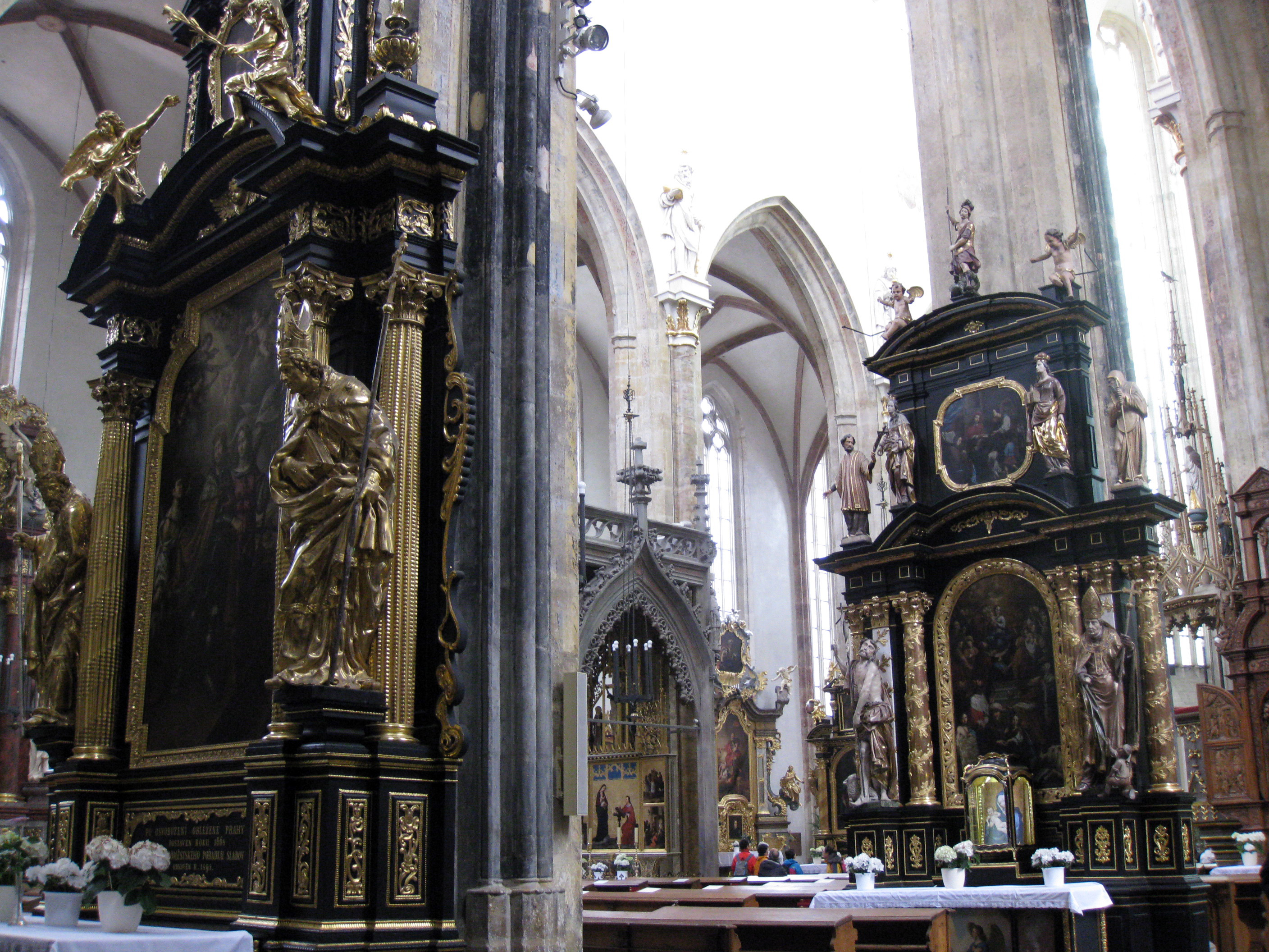 Praha 1-Staré Město, Týnský chrám.